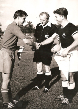 Hagenmiller, Kai & Fritz Walter 1956